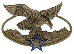 Insigne du BASM.